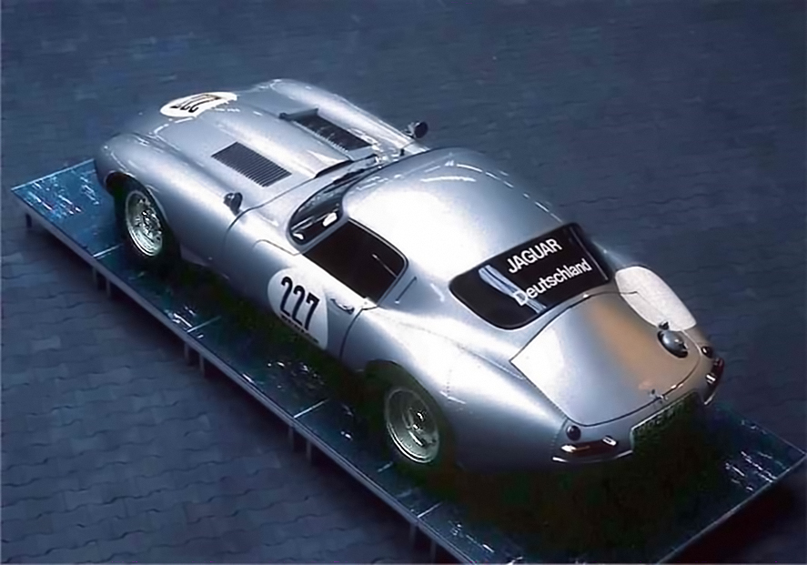 Jaguar E-Type „Lindner-Lightweight“ (wahrscheinlich Replikat von Lynx Motors) im Rennsportmuseum am Nürburgring